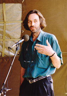 Kerényi Imre szól hozzá az első év vitájához - Szárszói Találkozó 1993